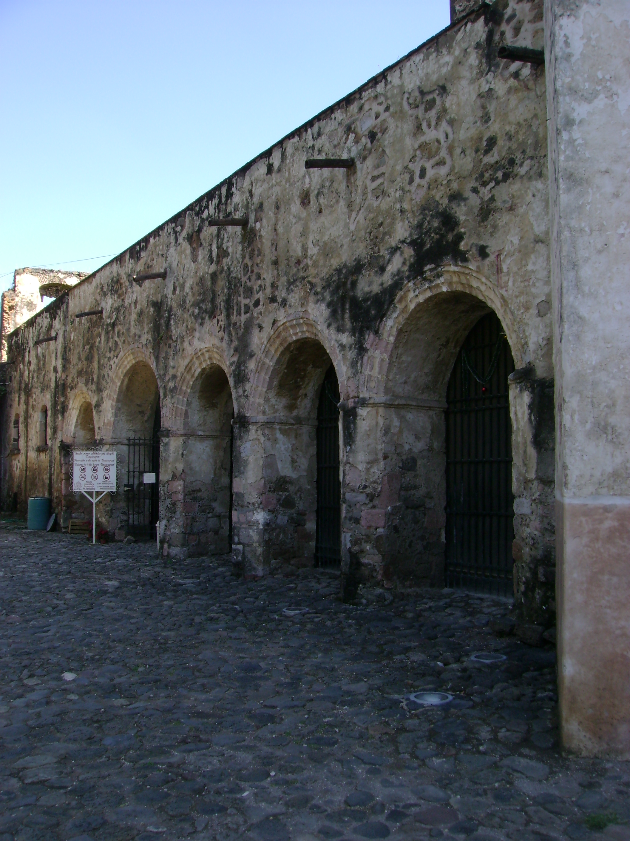 Templo y Antiguo Convento de San Juan Bautista